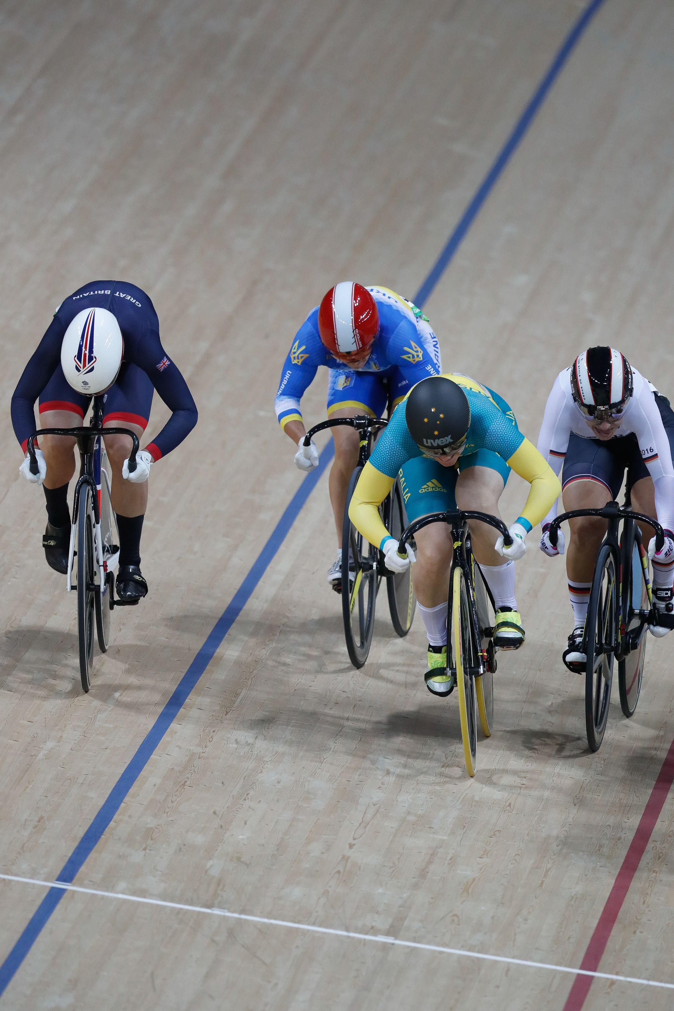 Rio de Janeiro - A holandesa Elis Ligtlee ganha medalha de ouro ao vencer a corrida Keirin de ciclismo no VelГіdromo dos Jogos Rio 2016, no Parque OlГ­mpico. (Fernando FrazГЈo/AgГЄncia Brasil)